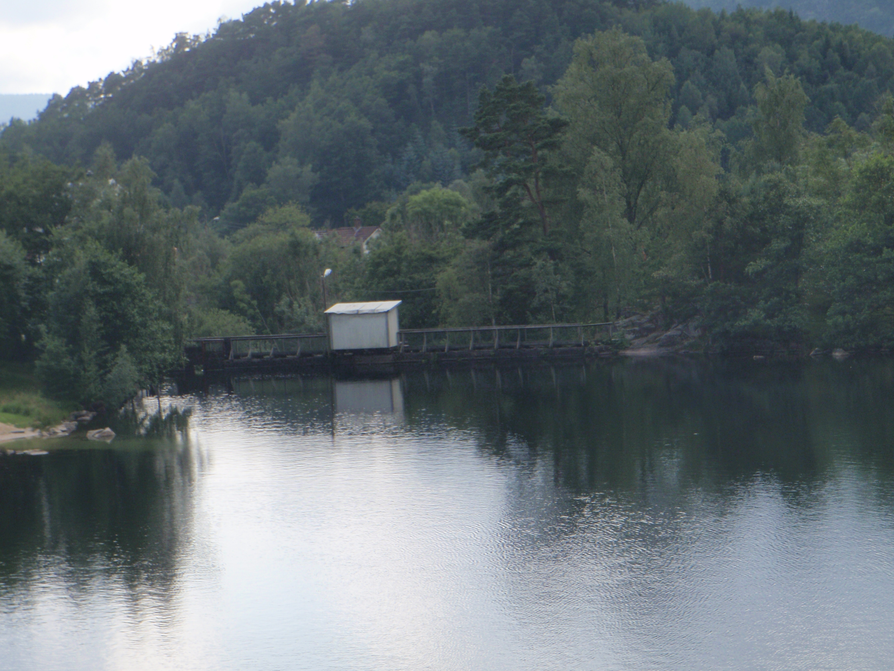 Stemhølen, Drangeid i Flekkefjord var starten på en sikker vannforsyning nedover elva, som har gitt vann og energi til både kverner, garveri og tønneproduksjon. Dammen sørger fortsatt for stabil vannstand på Selura